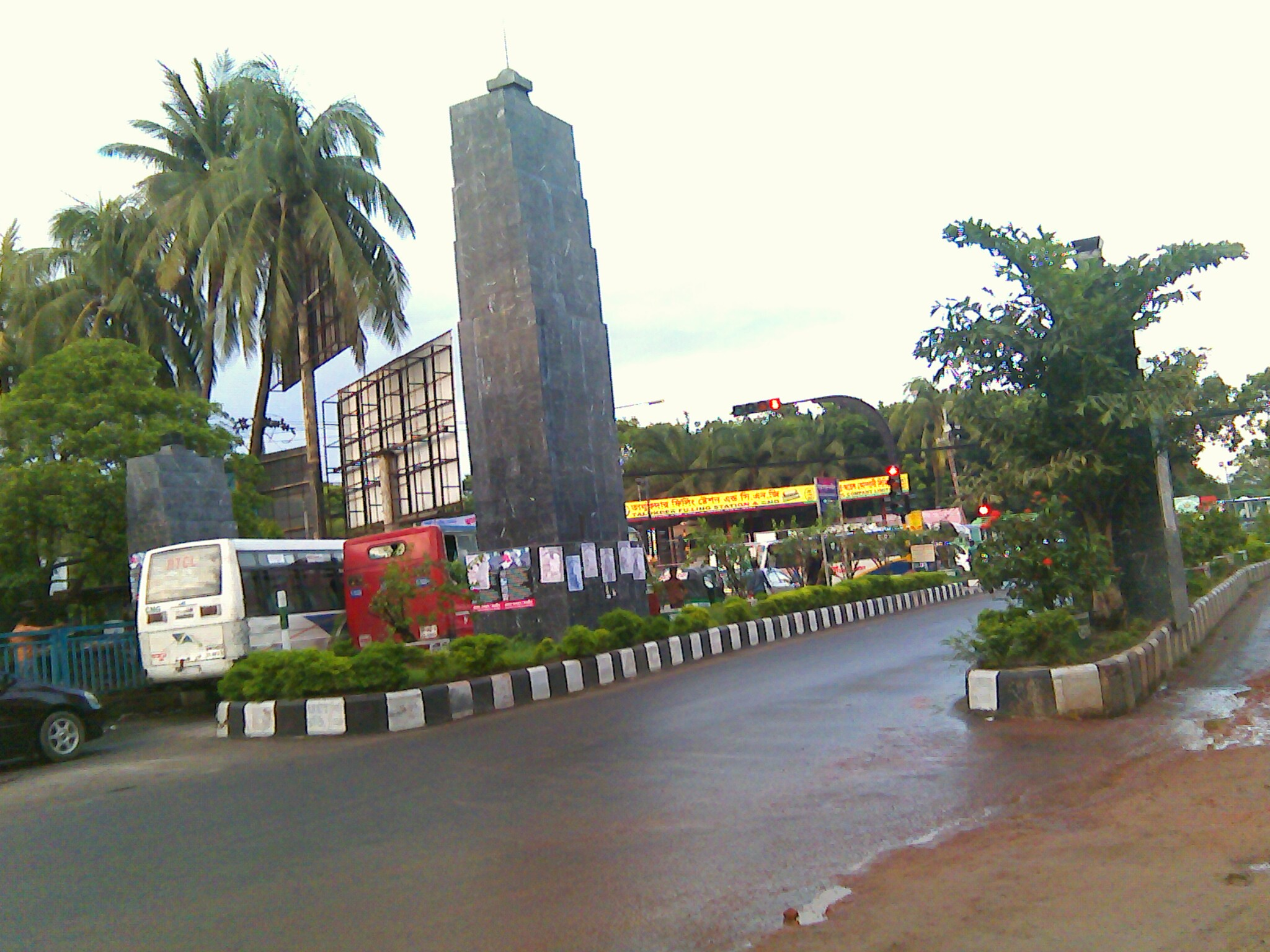 আসাদ গেটের ছবি, নিজের তোলা